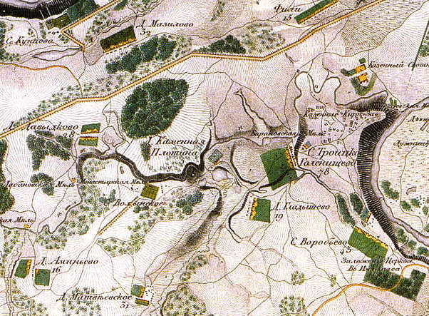 Участок. Топографическая карта окружности Москвы, снятая офицерами Квантирмейстерской части 1818 года. Гравирована и печатана в военно-топографическом бюро при главном штабе его импереторского Величества 1823 года.